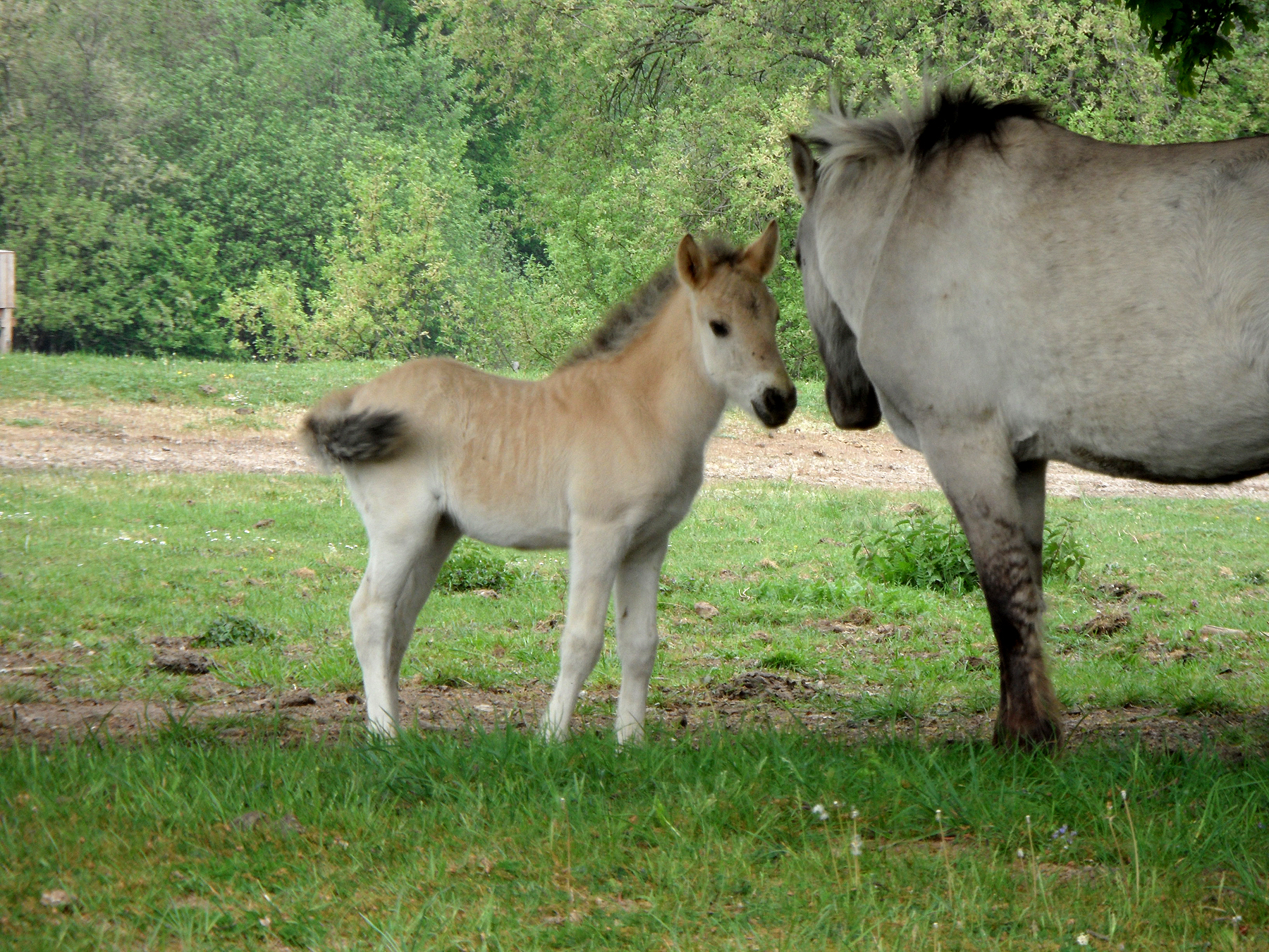 Der Konik ist eine polnische Ponyrasse, die eng mit dem osteuropäischen Wildpferd Tarpan verwandt ist. Seit September 2009 betreibt der NABU Rheinland-Pfalz auf dem ehemaligen militärischen Übungsplatz Schmidtenhöhe (Koblenz) das Projekt „Halboffene Weidelandschaft“. Hier werden 130 Hektar Naturschutzflächen von Taurus-Rindern und Koniks beweidet, um die Ausbreitung von Gehölzen zu verhindern und so einen geeigneten Lebensraum für selten gewordene Tier- und Pflanzenarten zu erhalten.